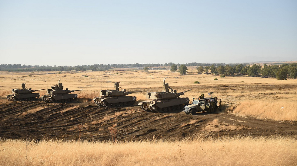 יחידת מיתר